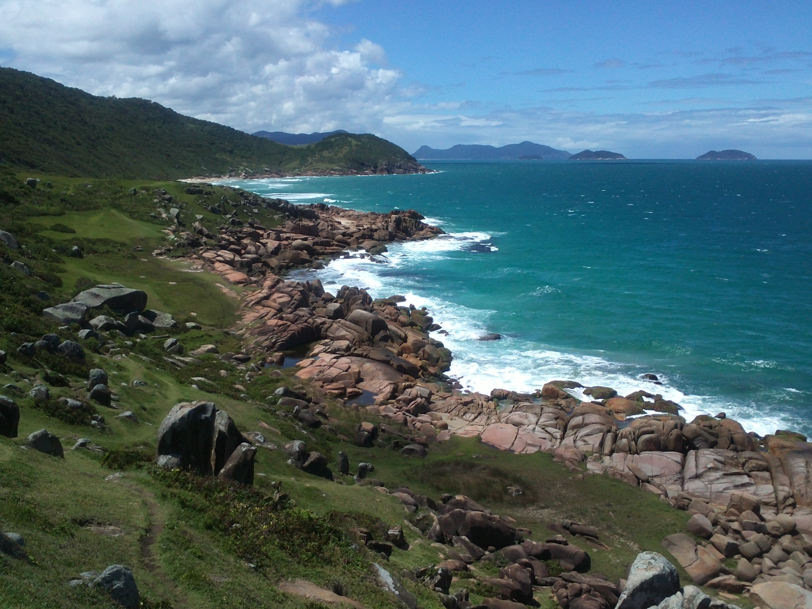 Praia Guarda do Embaú em Novembro de 2012.